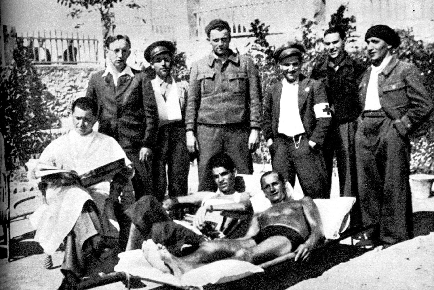 Srpskohrvatski / српскохрватски: Jugoslovenski ranjenici u bolnici u Alikante 1937. godine. Među ostalima i Veljko Vlahović (leži prvi s leva)